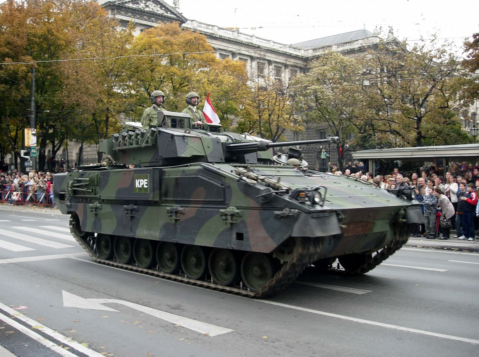 2005 Militärparade Wien Okt.26. 092